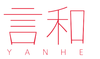 言和v3标志